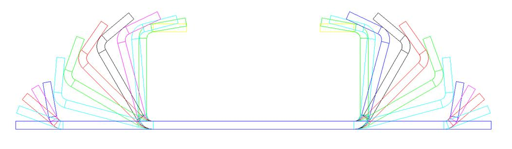 El diseño de herramientas para el proceso de perfilado parte del diagrama conocido como flor, que contiene las secciones transversales previstas para todas las estaciones de perfilado que se van a utilizar.